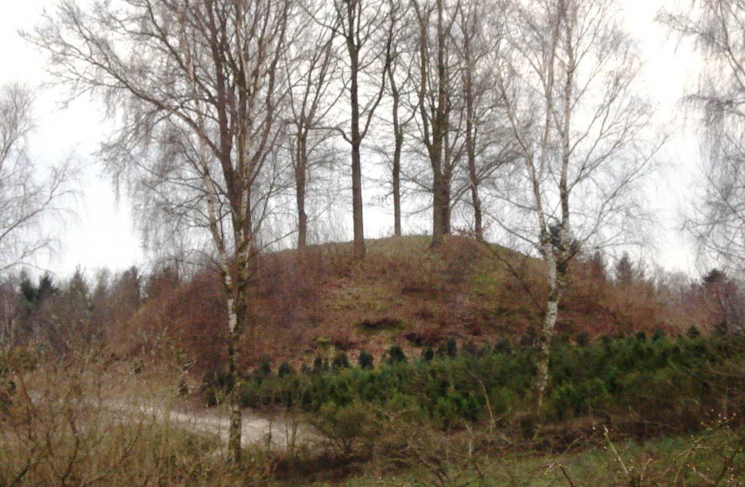 Grabhuegel bei Schuersdorf aus Norden